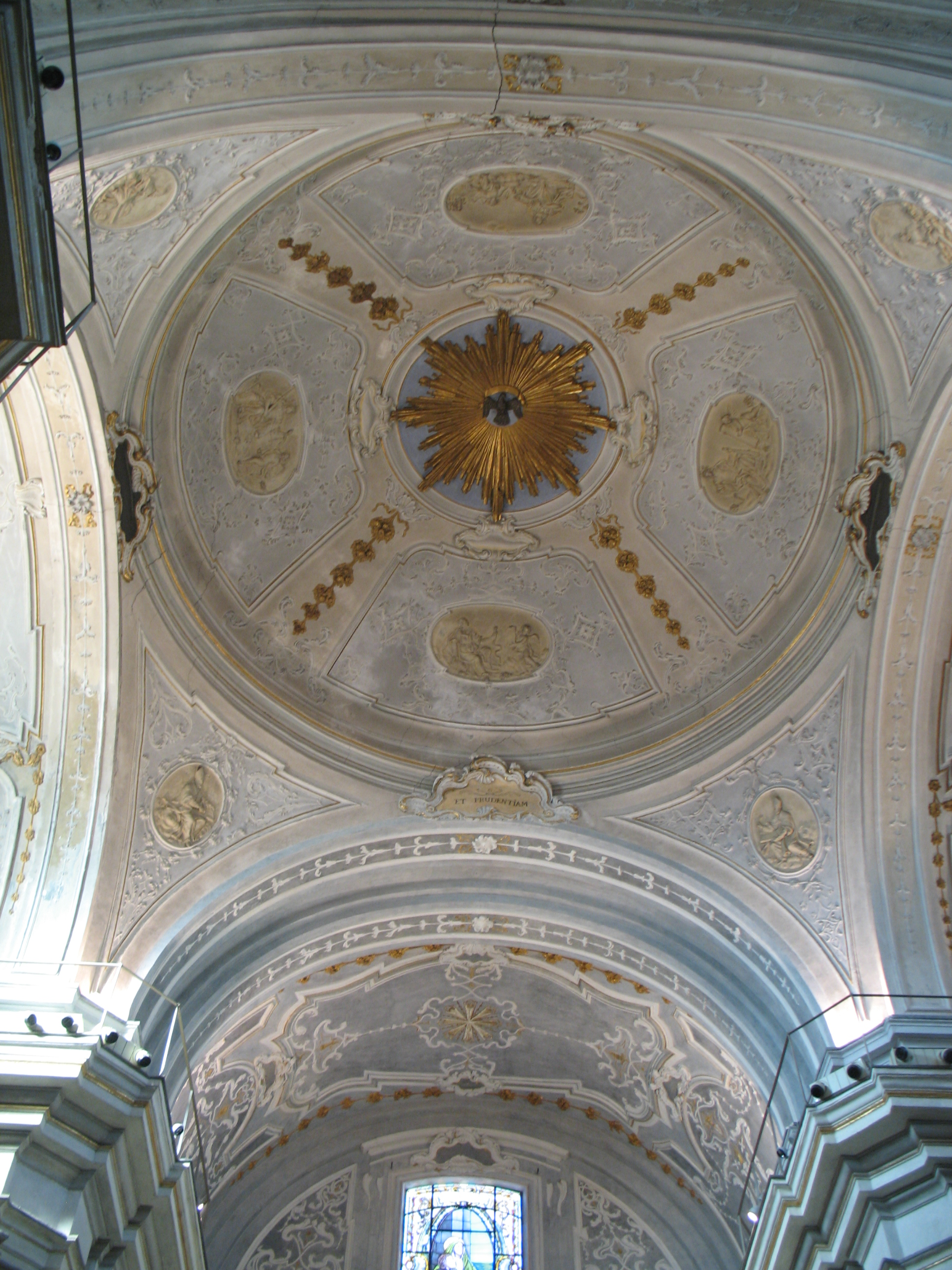 Cupola della Chiesa di Sant'Agostino (Chieti)